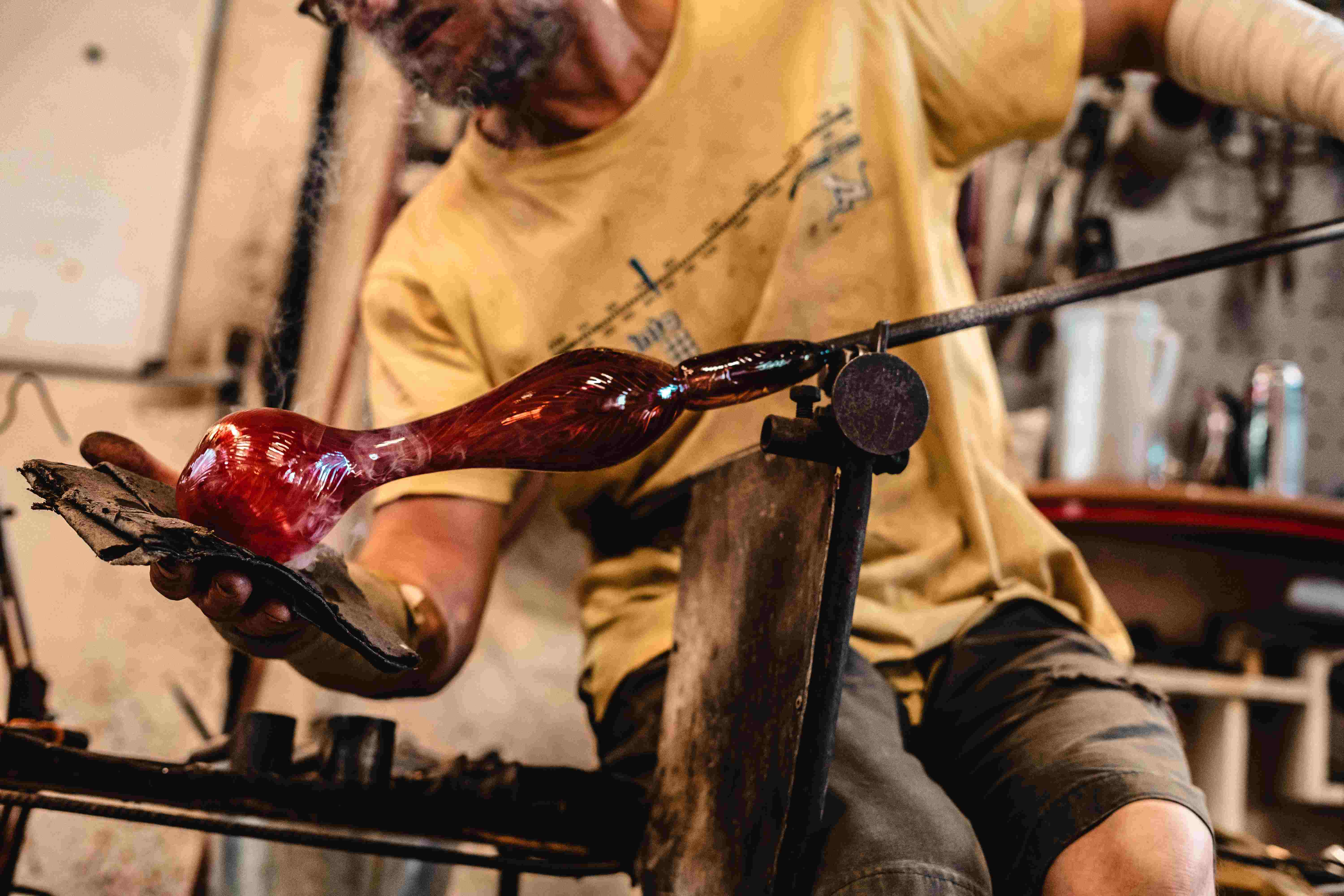 ruční výroba skla, hutní zpracování skla